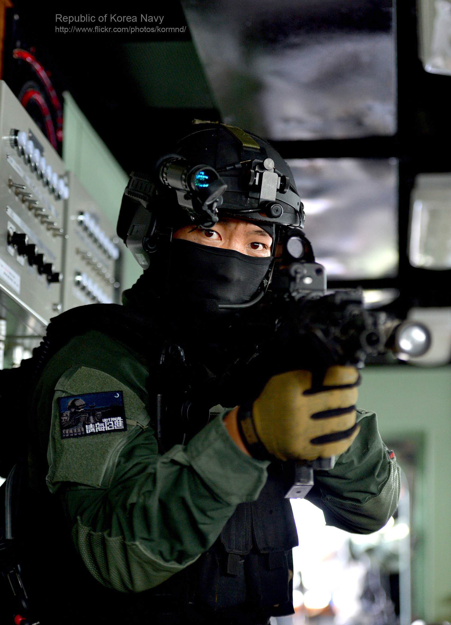 2013. 6. 청해부대원들의 일상생활 (1)